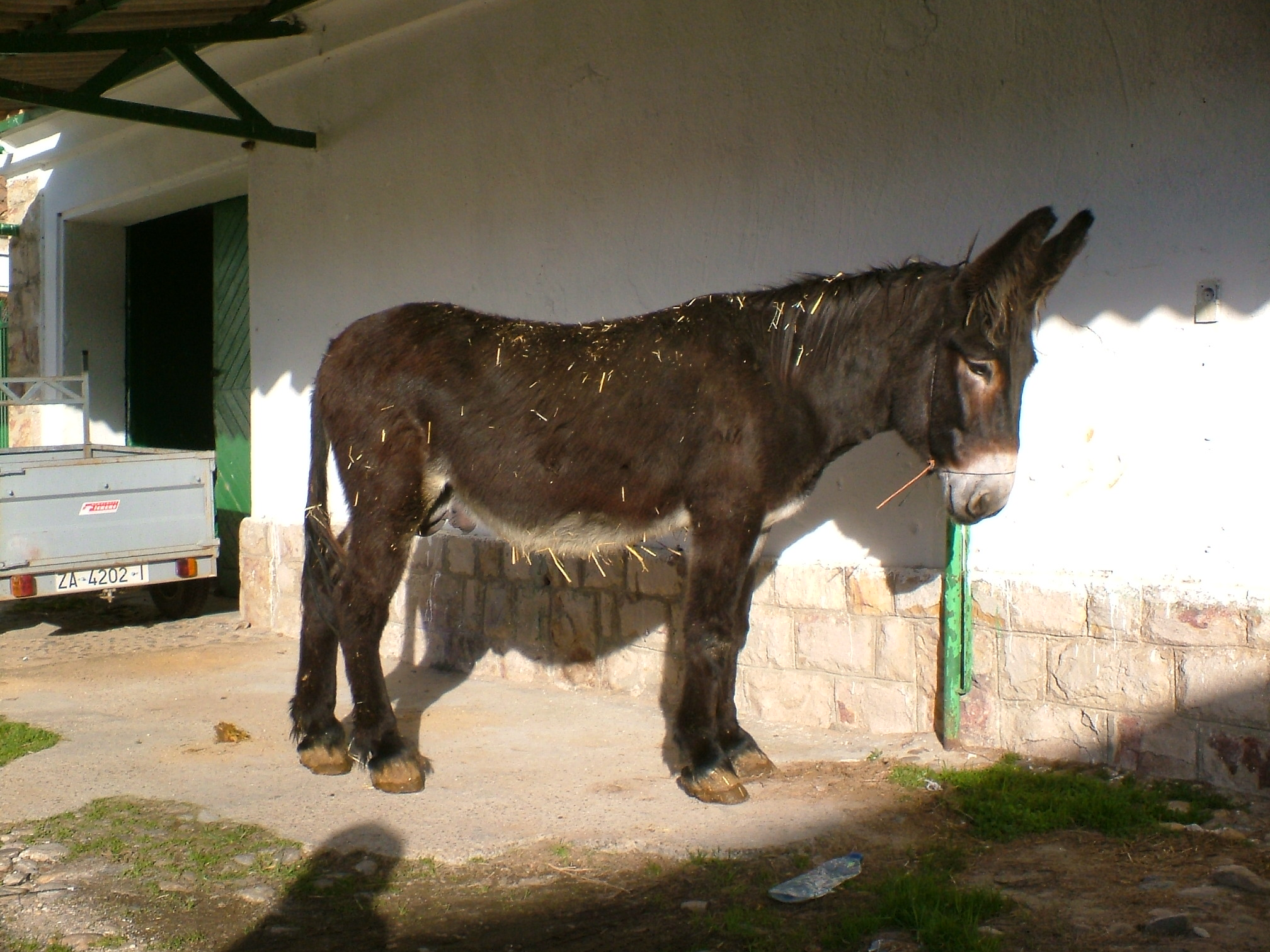 Garañón de Asno Zamorano-Leonés Zamora